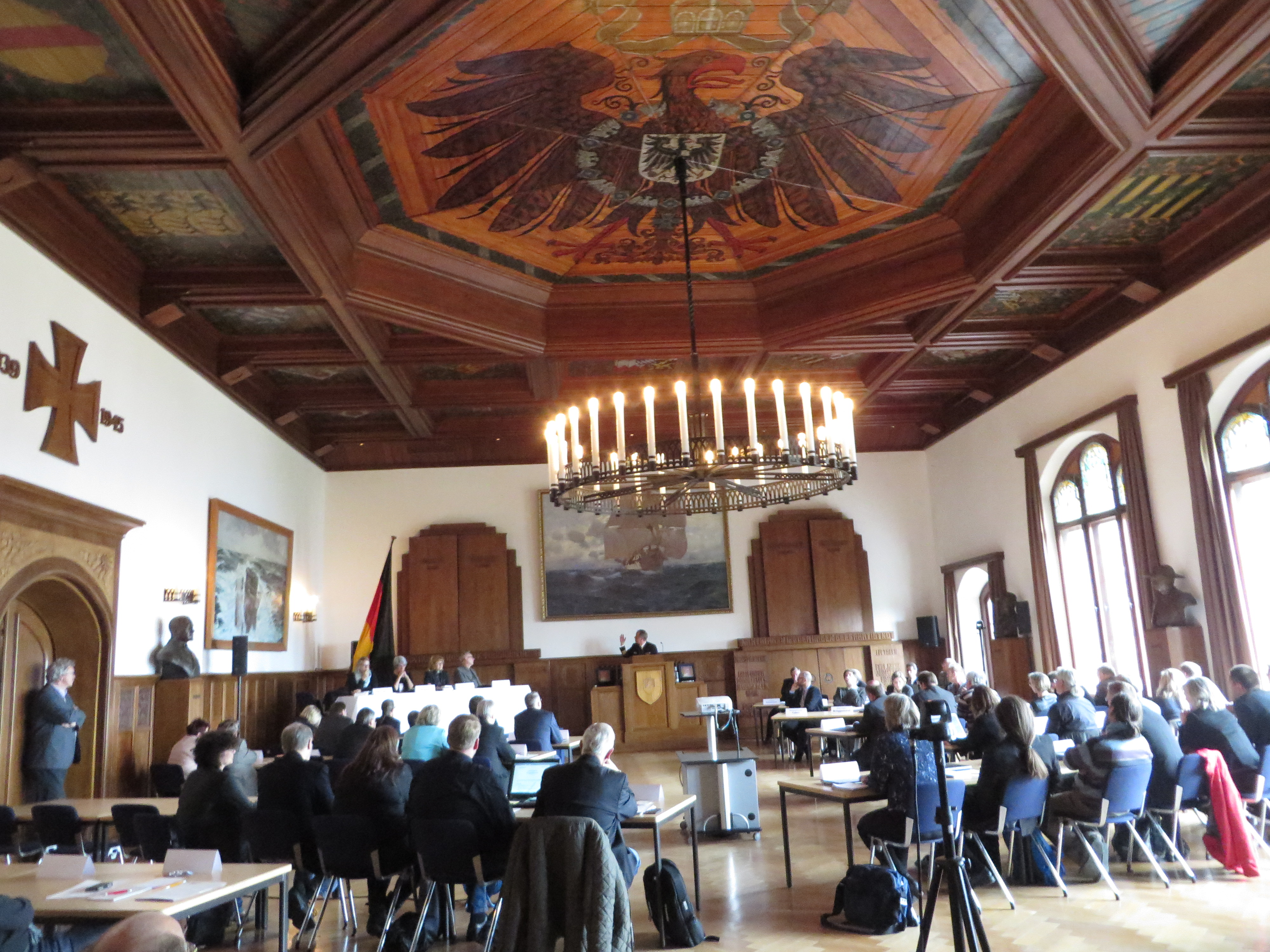 Flensburger Ratsversammlung, 7. Mai 2015, MSM-Aula, Begrüßung, Öffentlicher Teil, Bild 05